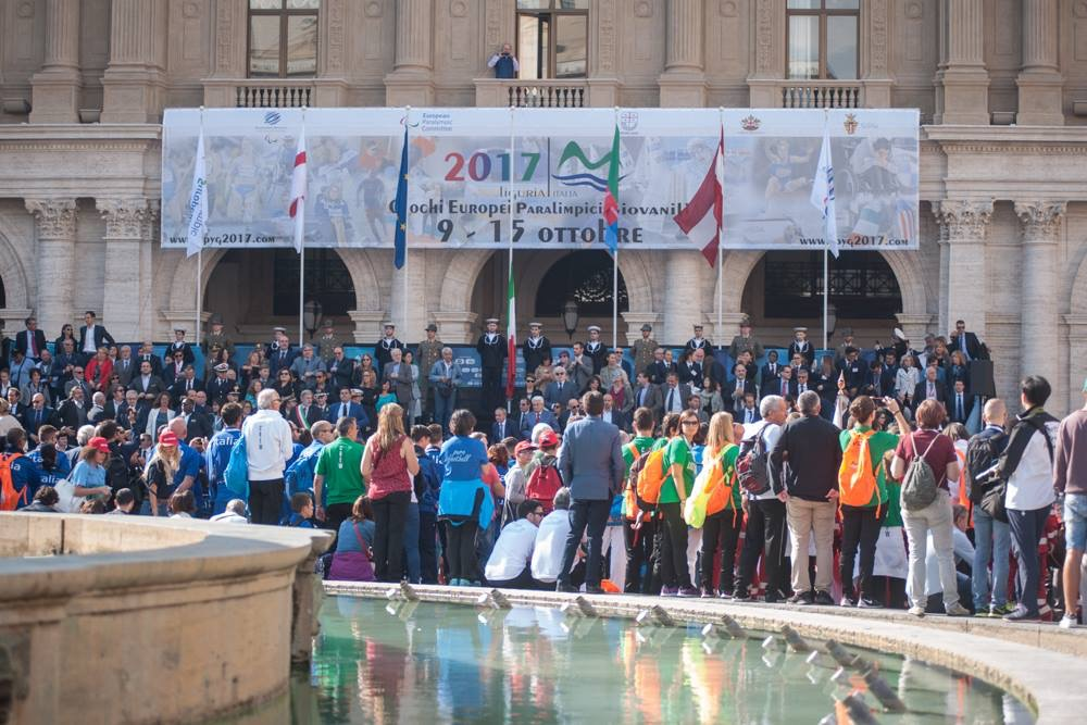 Immagine della cerimonia di apertura dei giochi paralitici 2017